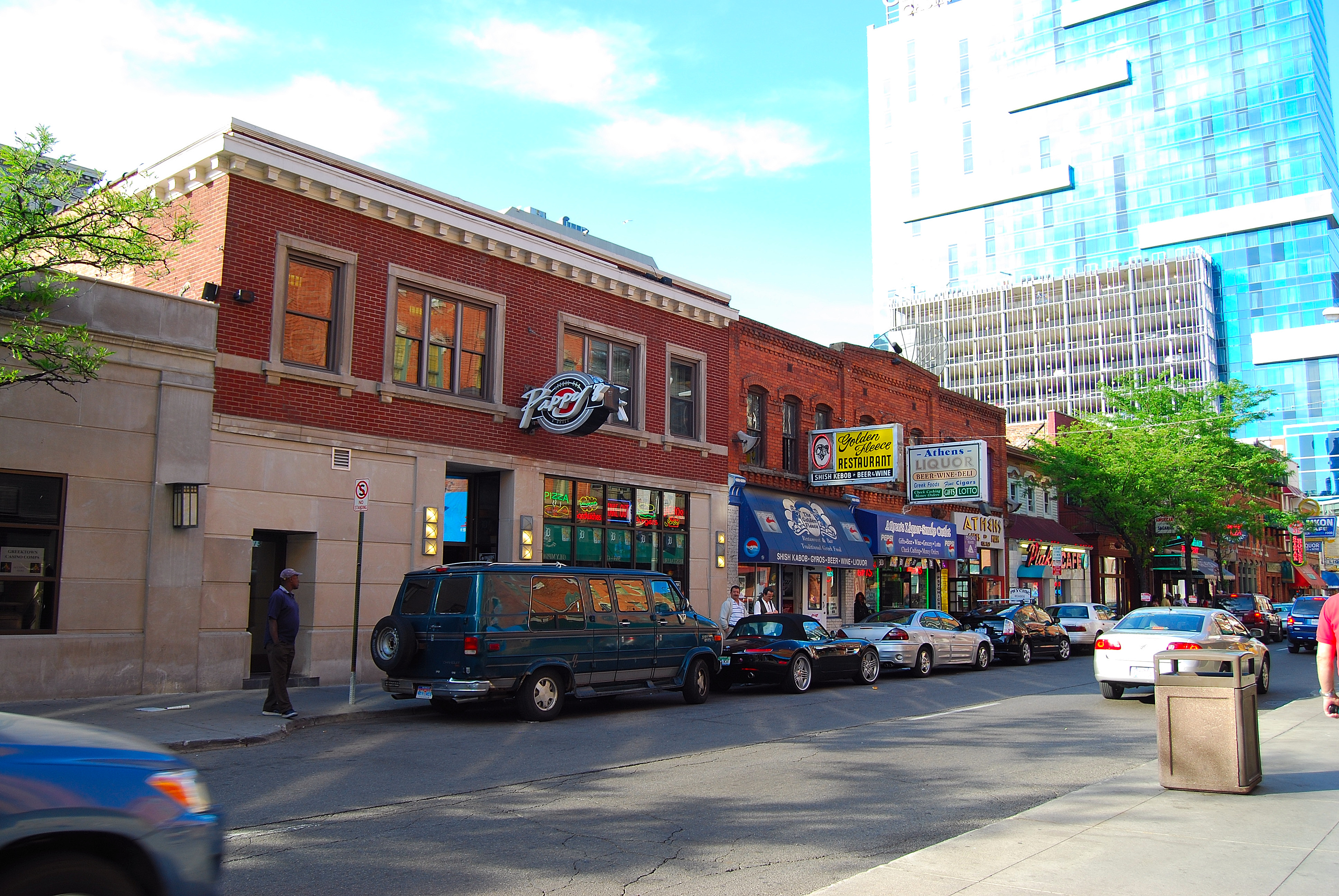 Greektown, Monroe St.